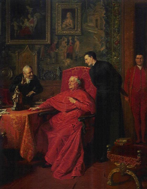 Eduard Theodor Ritter von Grützner († 2. April 1925)